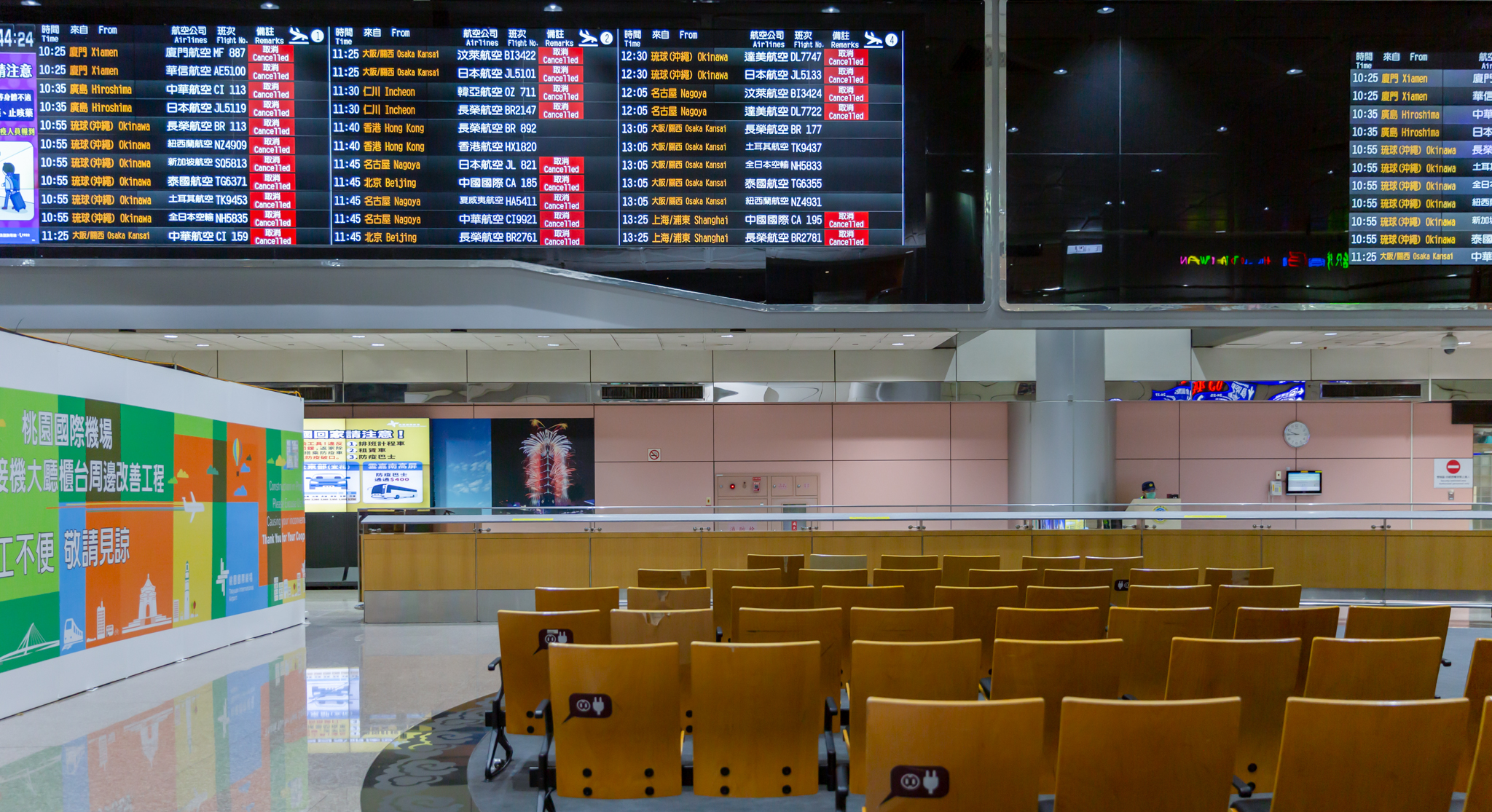 04.07 總統視察桃園機場海關防疫措施 疫情期間空蕩蕩的機場大廳